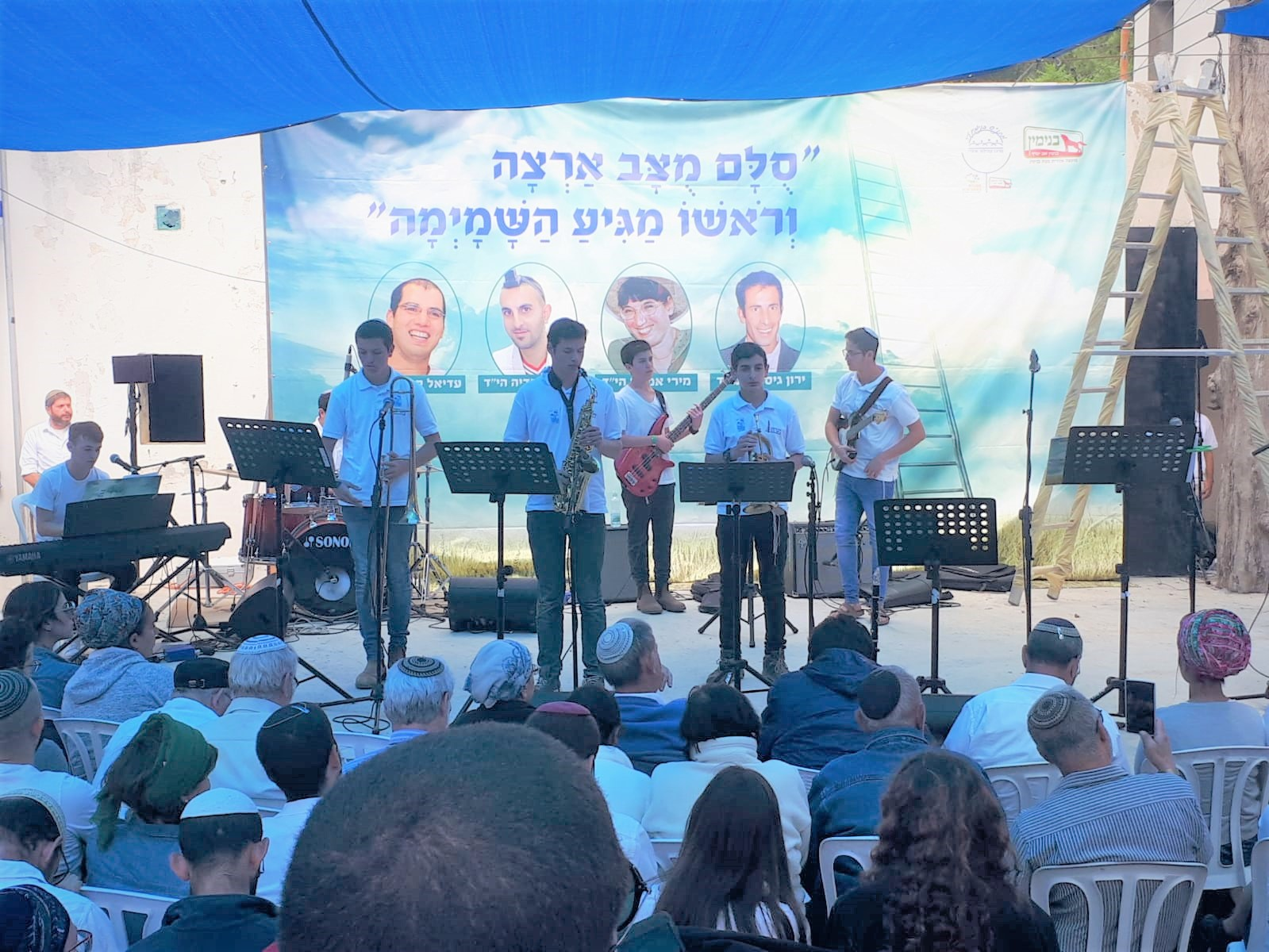 טקס יום הזיכרון 2019 תשע"ט מועצה אזורית מטה בנימין